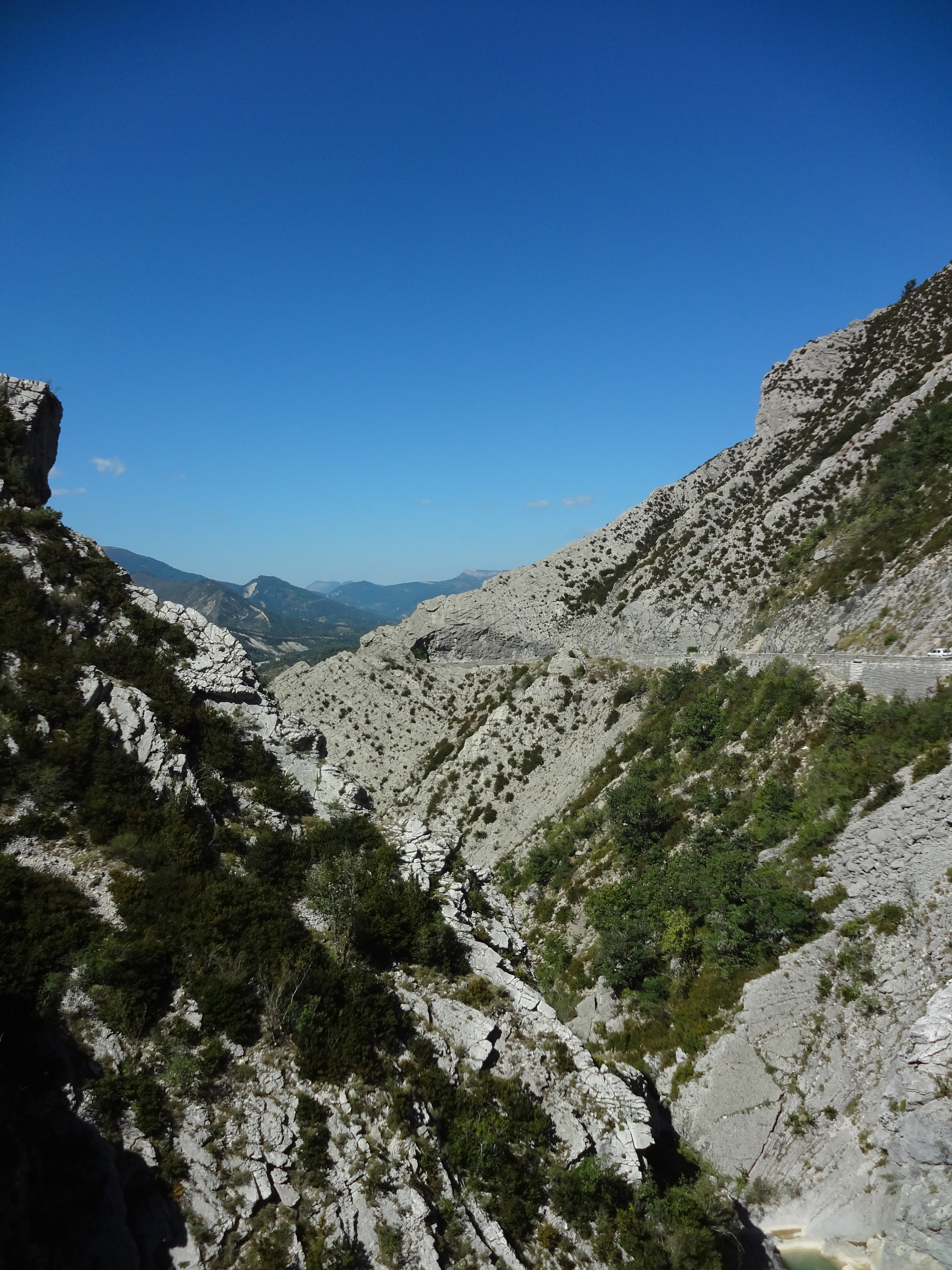 La clue de Taulanne est un passage resserré emprunté par l'ancienne RN 85 (ou route Napoléon), actuellement RD 4085, à environ 1000 m d'altitude (1007 m à la Roche Percée).